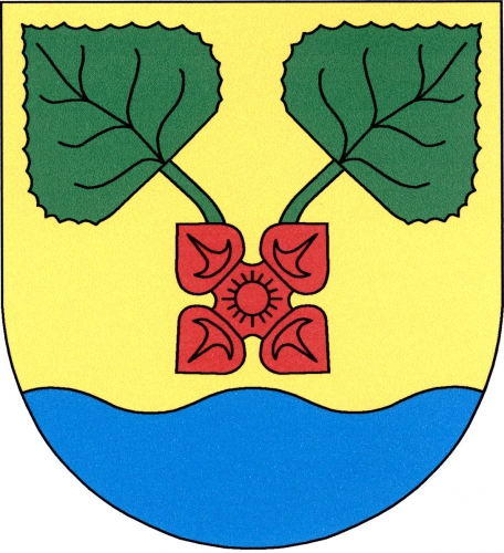 Znak obce Bítovany: Ve zlatém štítě nad modrou vlnitou patou kosmo červený plod kotvice, z něhož vyrůstají dva odkloněné zelené listy. Figury ve štítu mají vztah k chráněnému území rybníka Farář – modrá vlnitá pata štítu – a k vzácnému výskytu rostliny kotvice plovoucí – plod (ořech) a listy. Dva listy symbolizují, že obec tvoří dvě části. Zlatá je inspirována chráněnou geologickou lokalitou jílovitých a kvádrových pískovců ve stejném chráněném území.